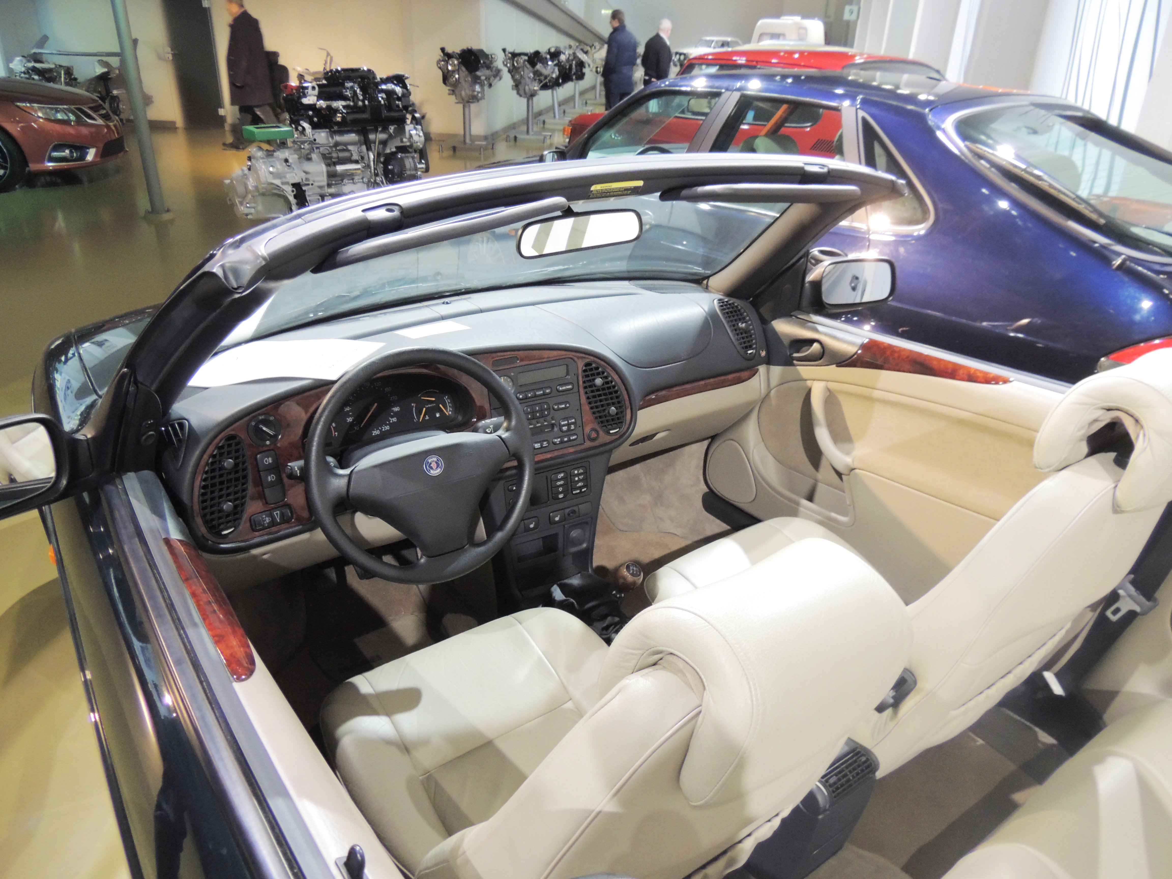 Wnętrze Saaba 900 cabrio